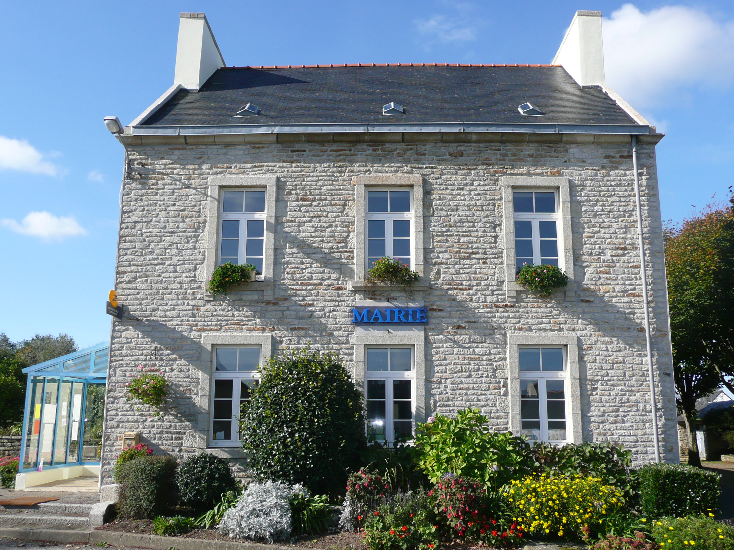 Mahalon est une petite commune du Finistère, plus précisément dans le Cap-Sizun, dans le canton de Pont-Croix. Cette commune de 21,39 km² et de 980 habitants, sait se démarquer des autres par son accueil et son patrimoine qui permet visites, ballades, sports et loisirs, mais également détente.